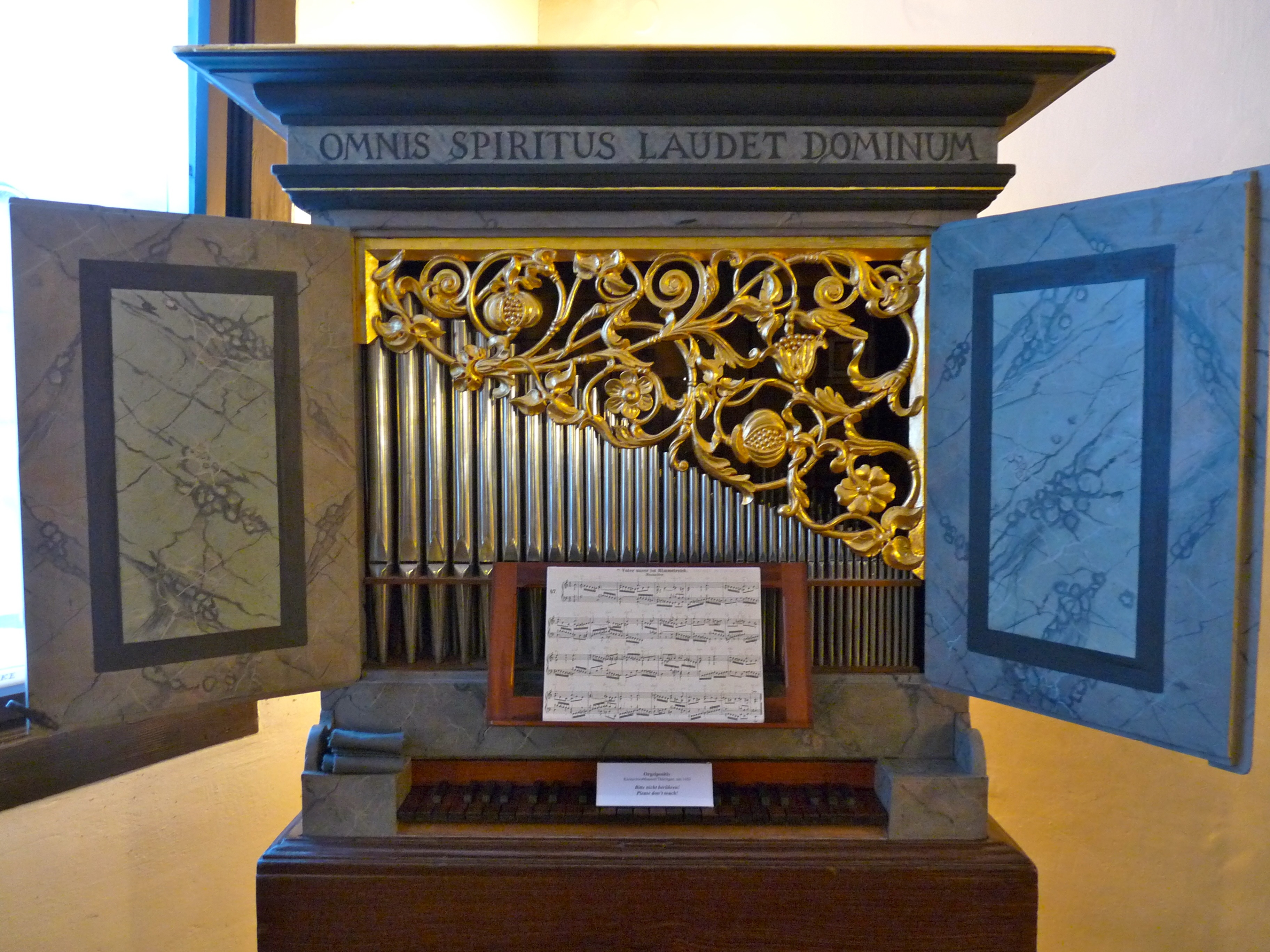 Thüringer Orgelpositiv von 1650 im Bachhaus in Eisenach.